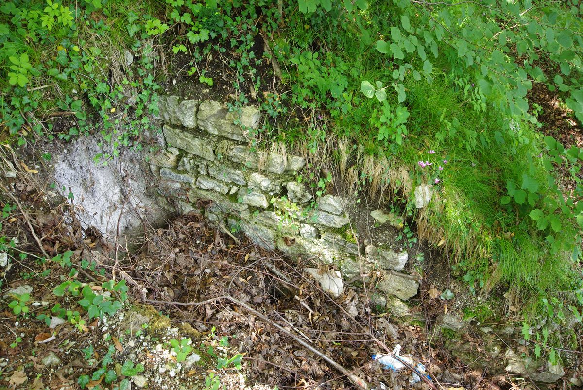 Burgstall Kirchberg, Bad Reichenhall